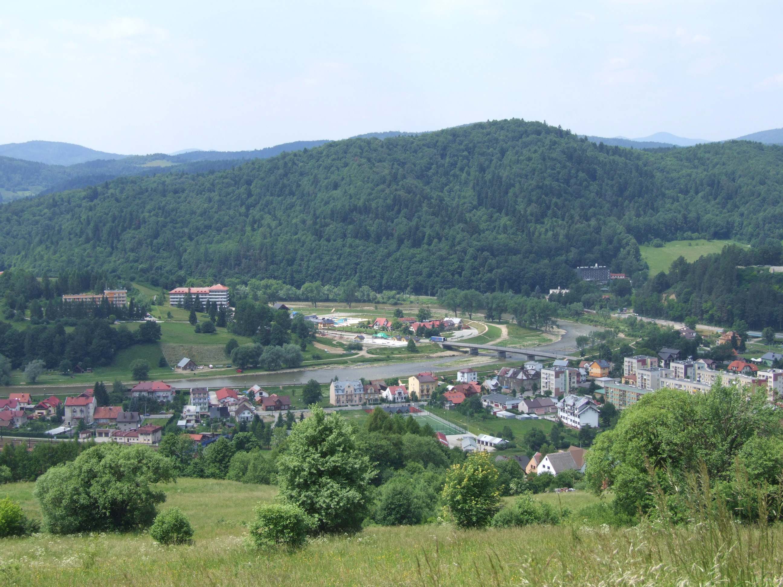 Przełom Popradu w Muszynie. Na pierwszym planie góra Mikowa, w dole Muszyna. Widok ze stoków Malnika nad Muszyną.